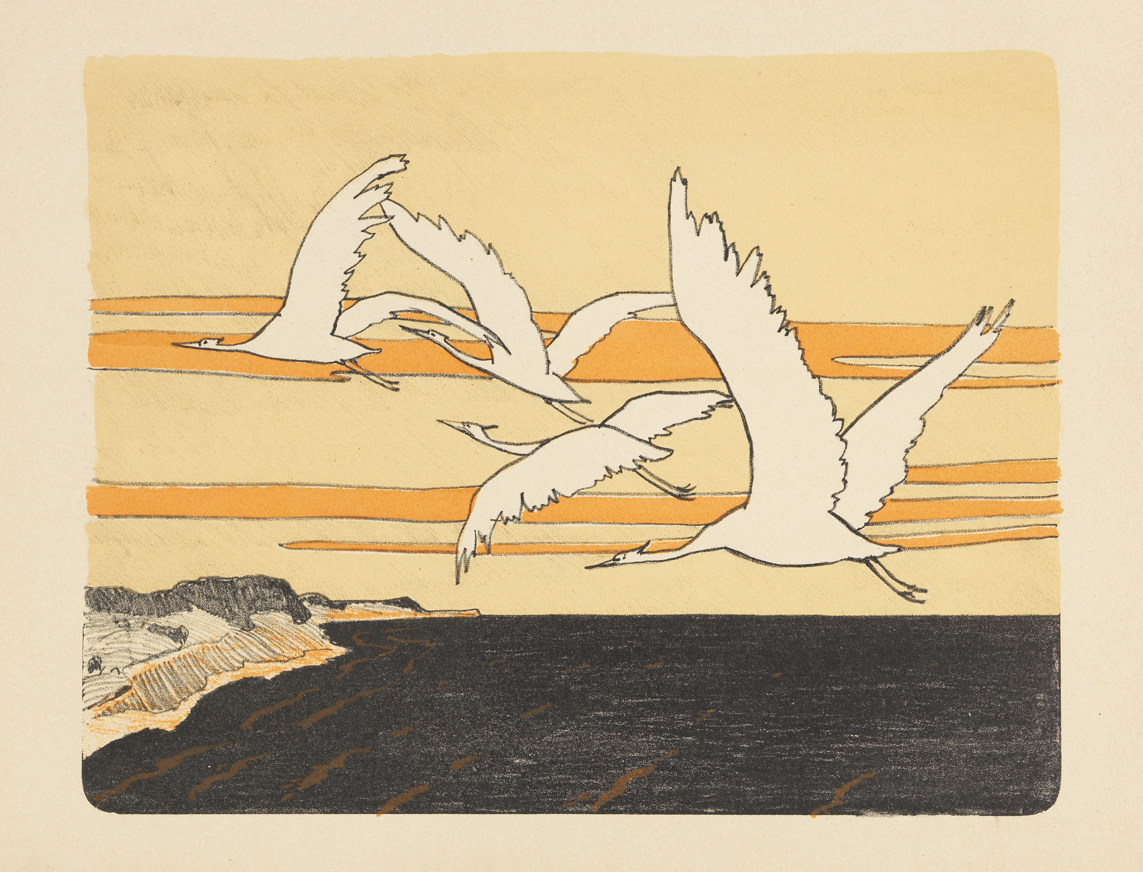 Kraniche. 1897/98. Farb-Algraphie. Auf Velin. 21,7 x 28 cm. Papier: 27,6 x 36,6 cm. Erschienen in PAN, Jg. IV, 1898, Heft 2, zw. S. 88/89. Gedruckt bei Jos. Scholz in Mainz. Literatur: Nass 8 III b (von III b). Söhn HDO 52902-3.